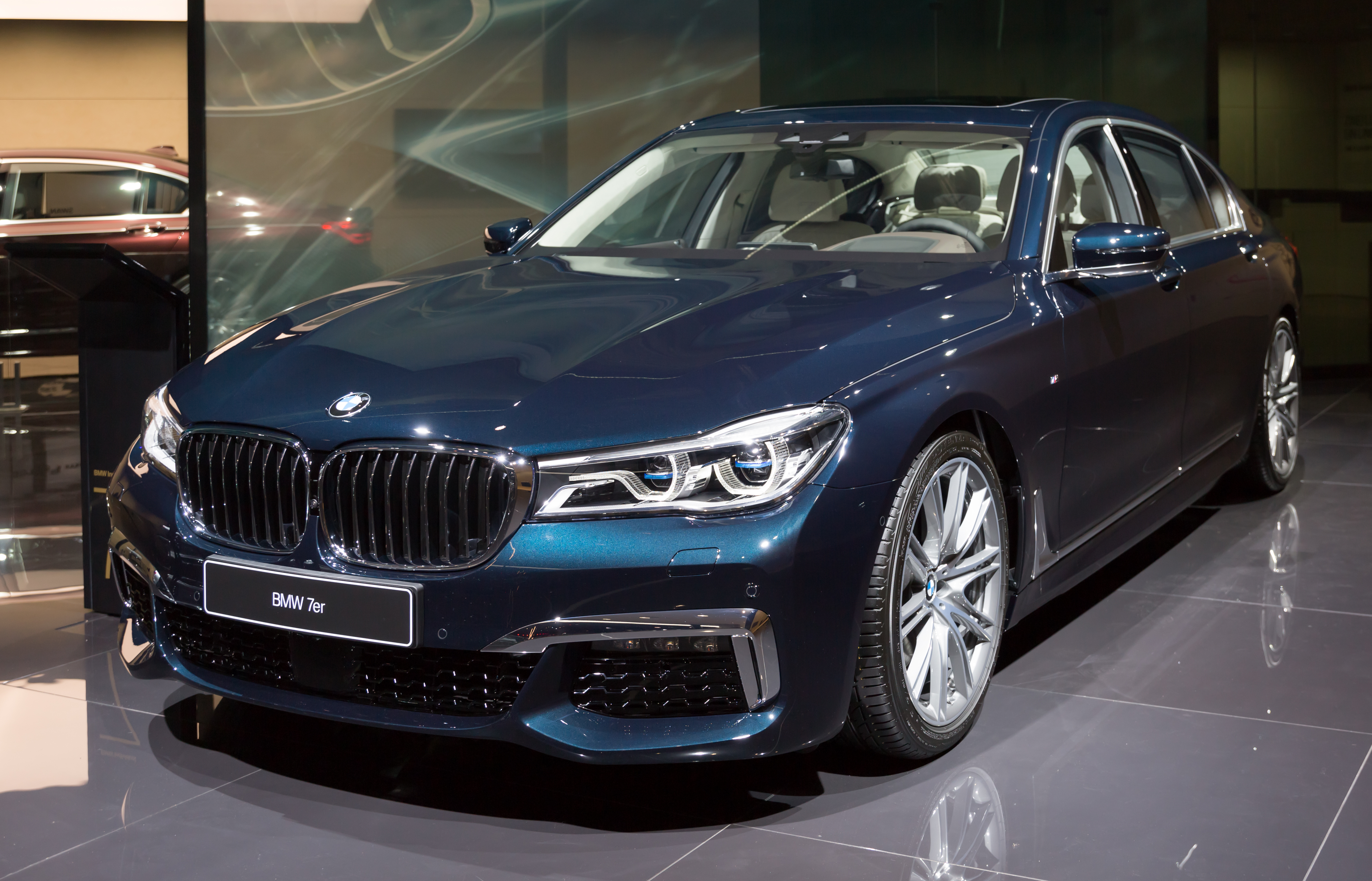 BMW 7 Series